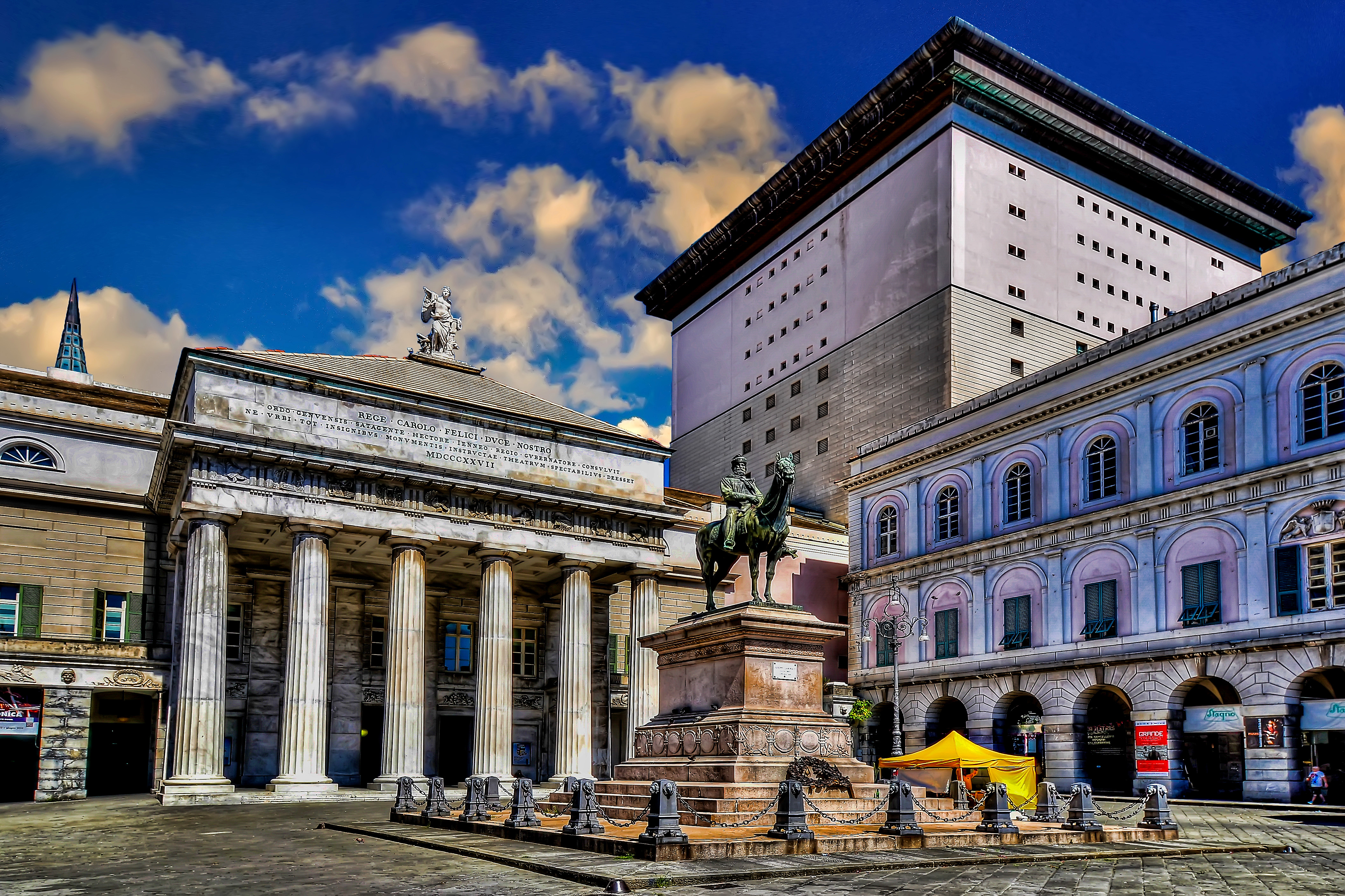 Teatro Carlo Felice This is a photo of a monument which is part of cultural heritage of Italy.